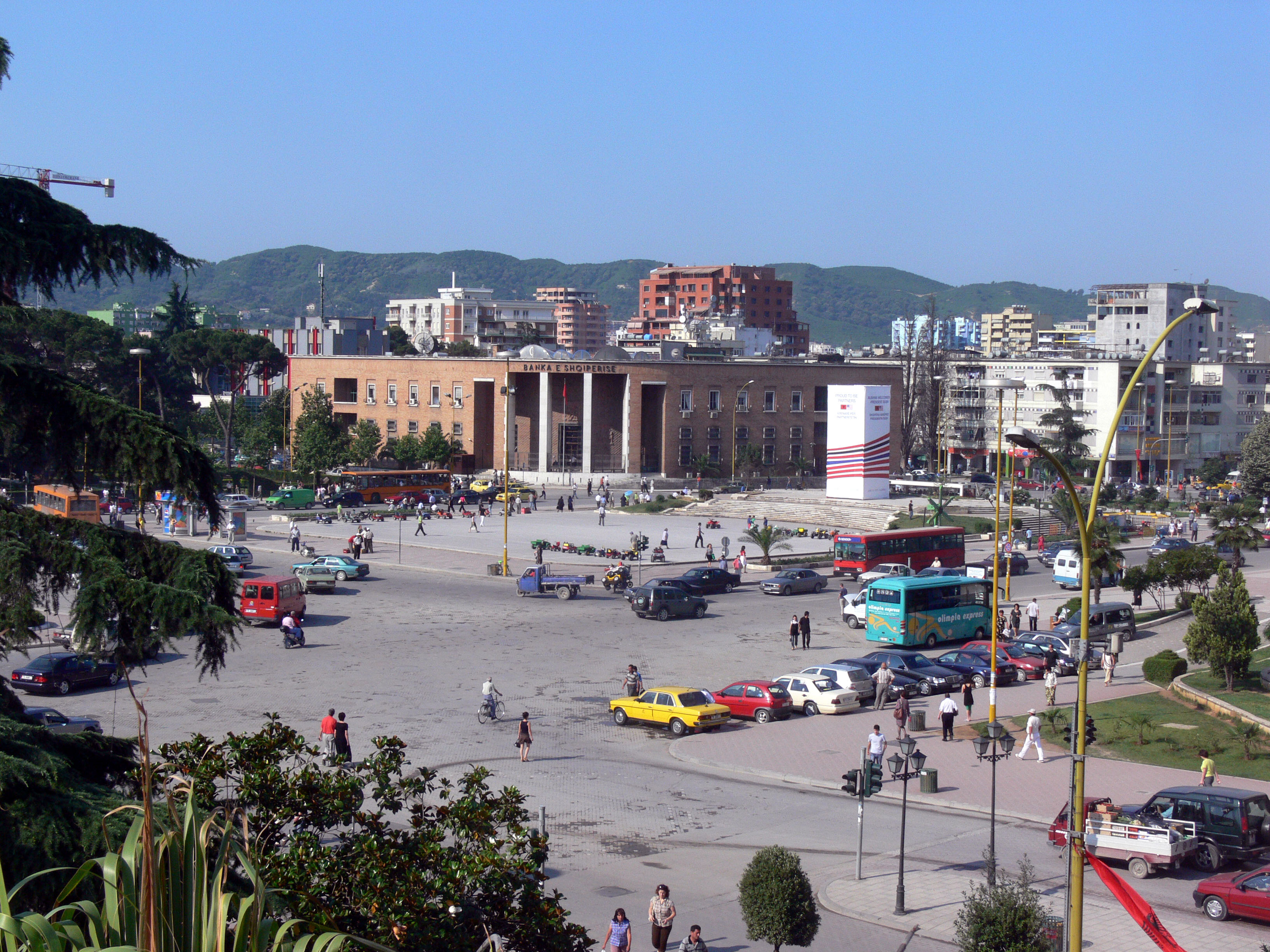 Tirana.